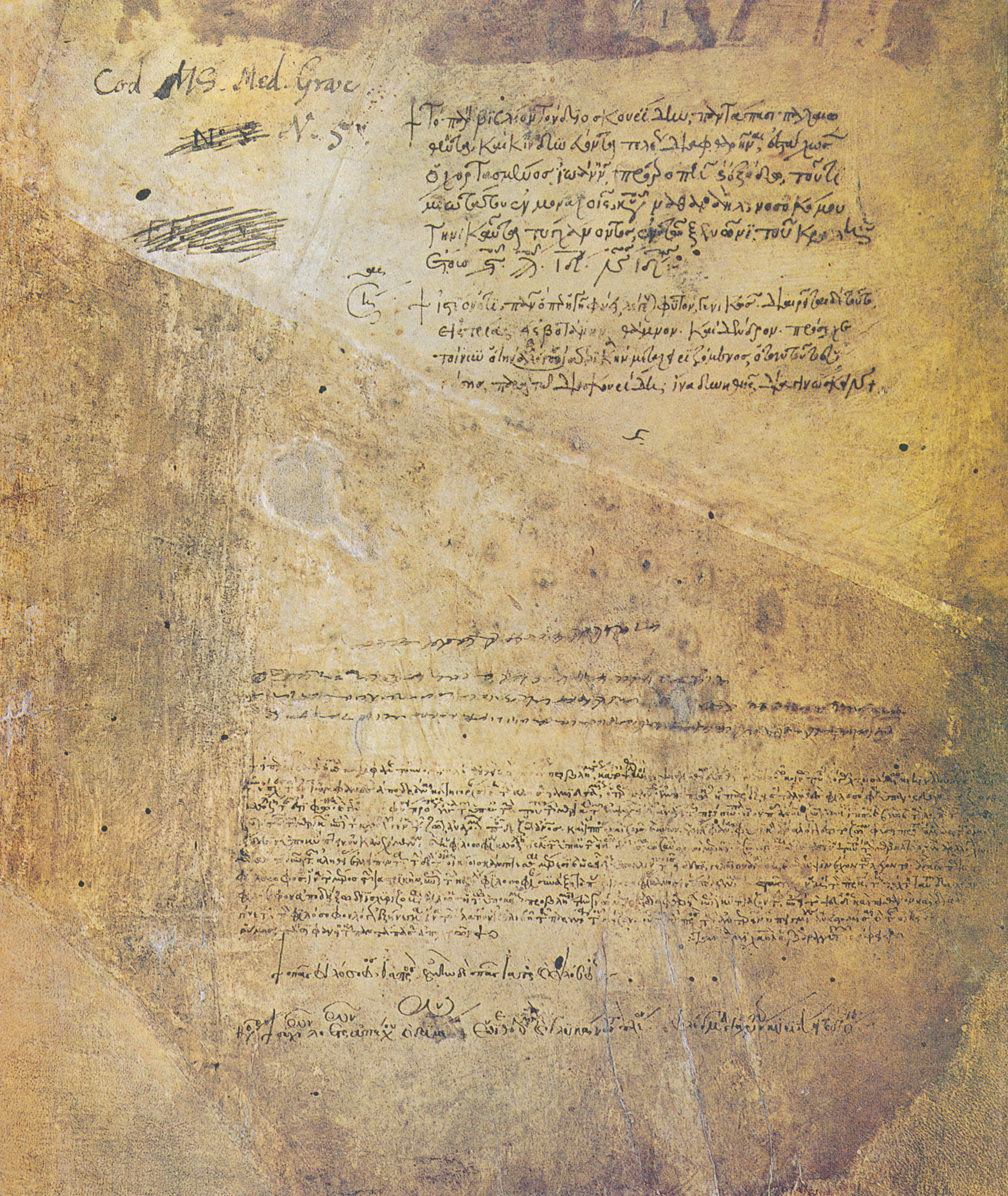 Die erste Seite des Wiener Dioskurides (fol. 1 recto) mit verschiedenen Notizen: u. a. oben in griechischer Minuskel Johannes Chortasmenos über die Restaurierung des Kodex im Jahr 1406